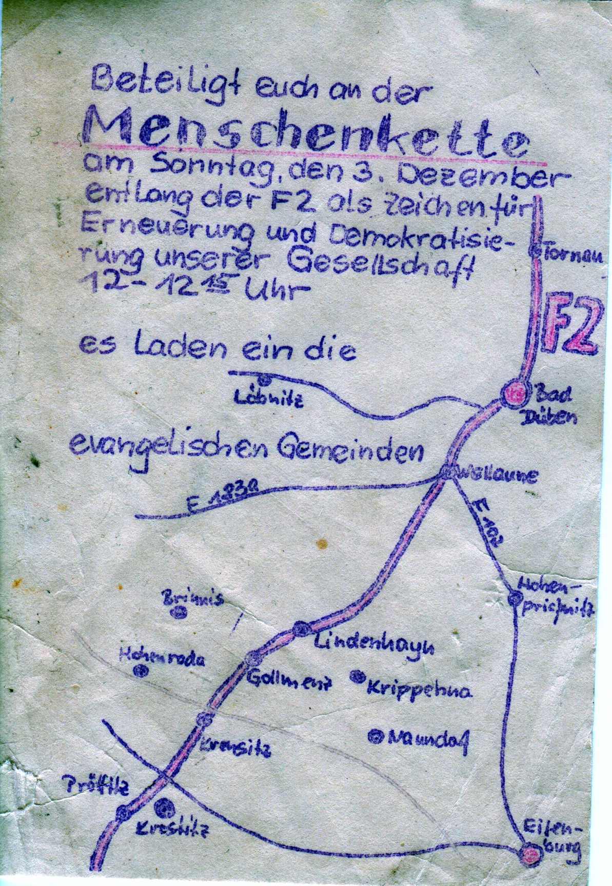 Flugblatt mit Aufruf zur Menschenkette am 3.Dezember (1989) zur Erneuerung und Demokratisierung der Gesellschaft